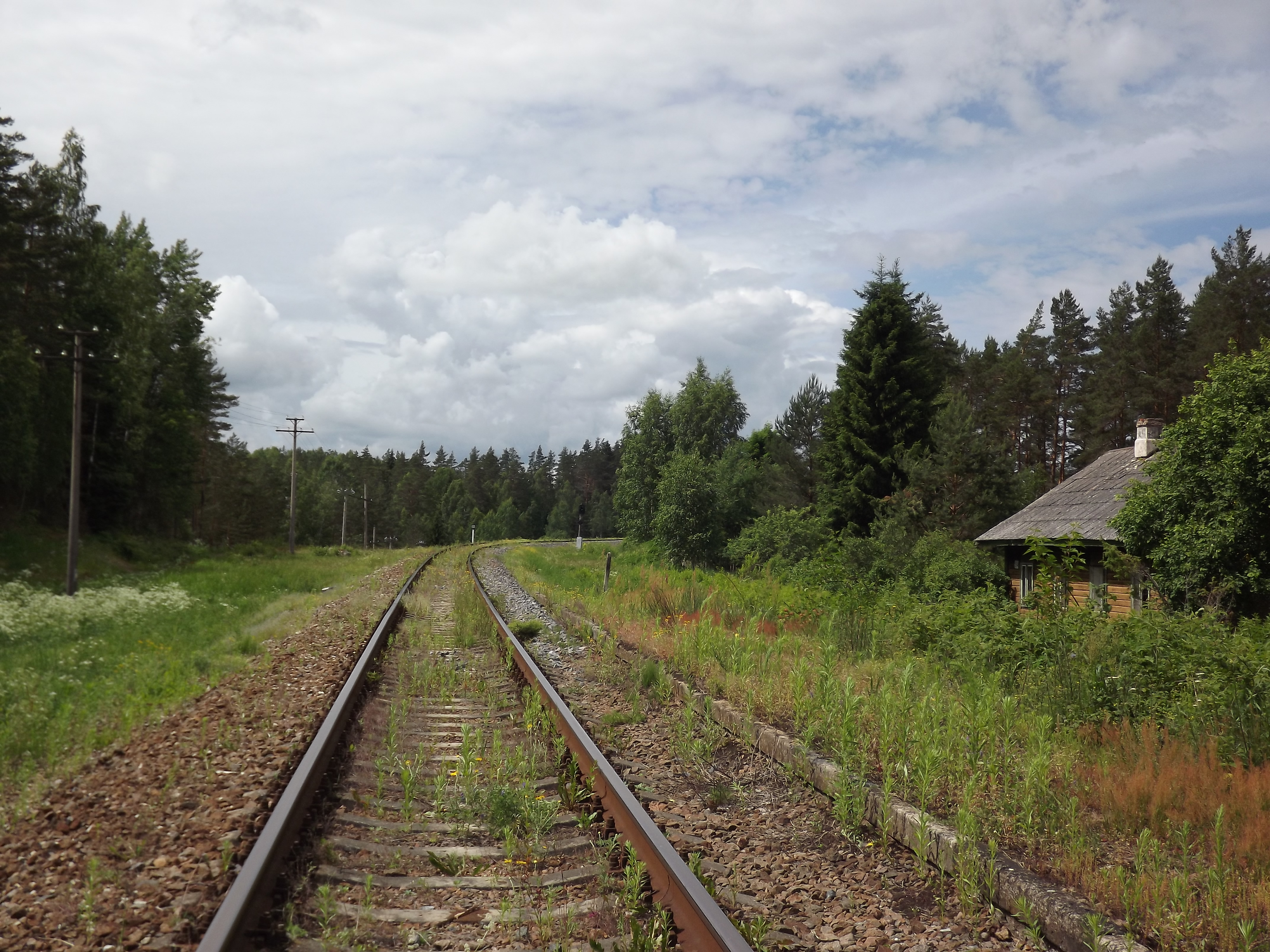 Tuderna raudteepeatus